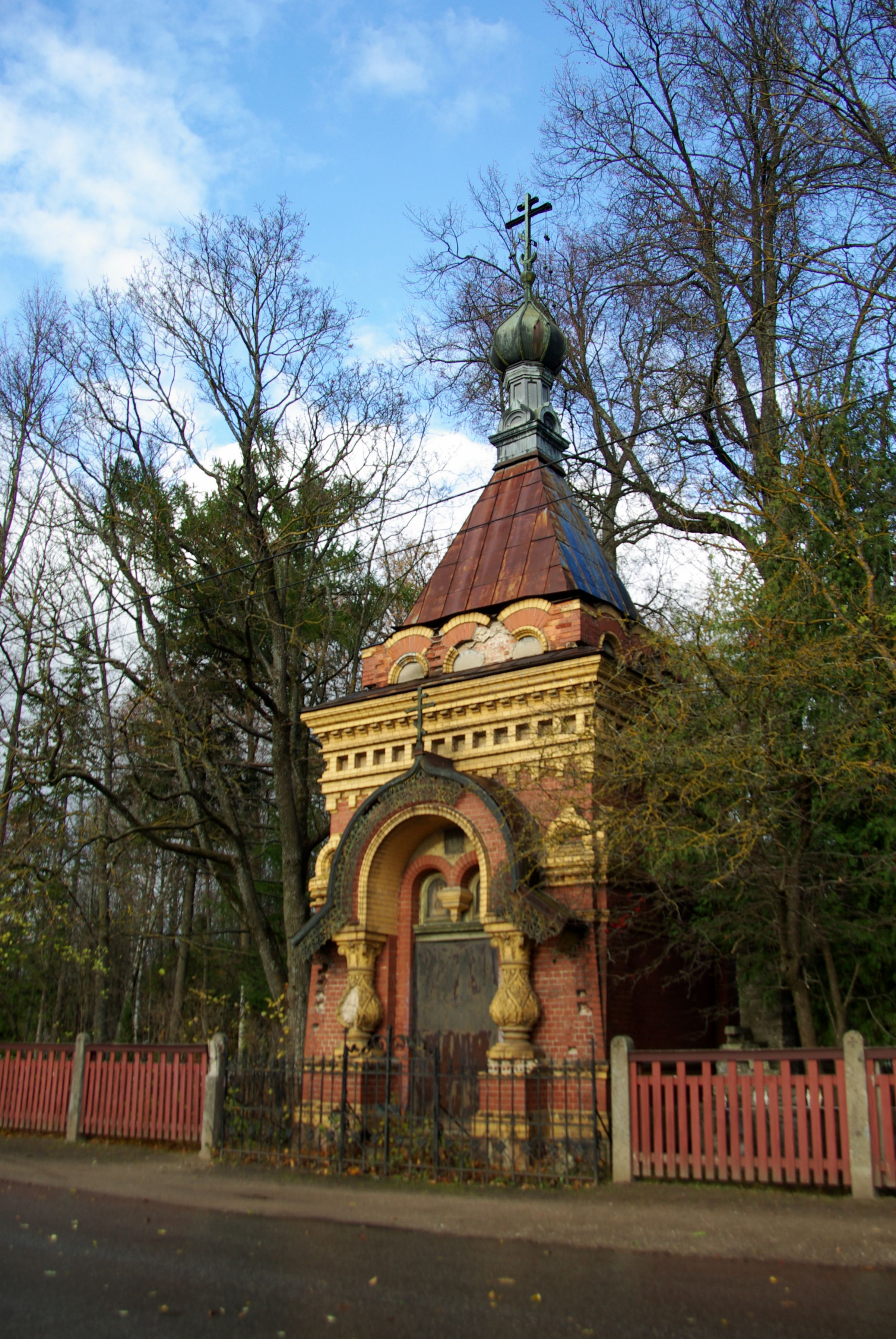 Kalmistu Tartus, osa Raadi kalmistust.Kalmistu asub Raadi kalmistu edelaküljel Kalmistu tänava ääres.